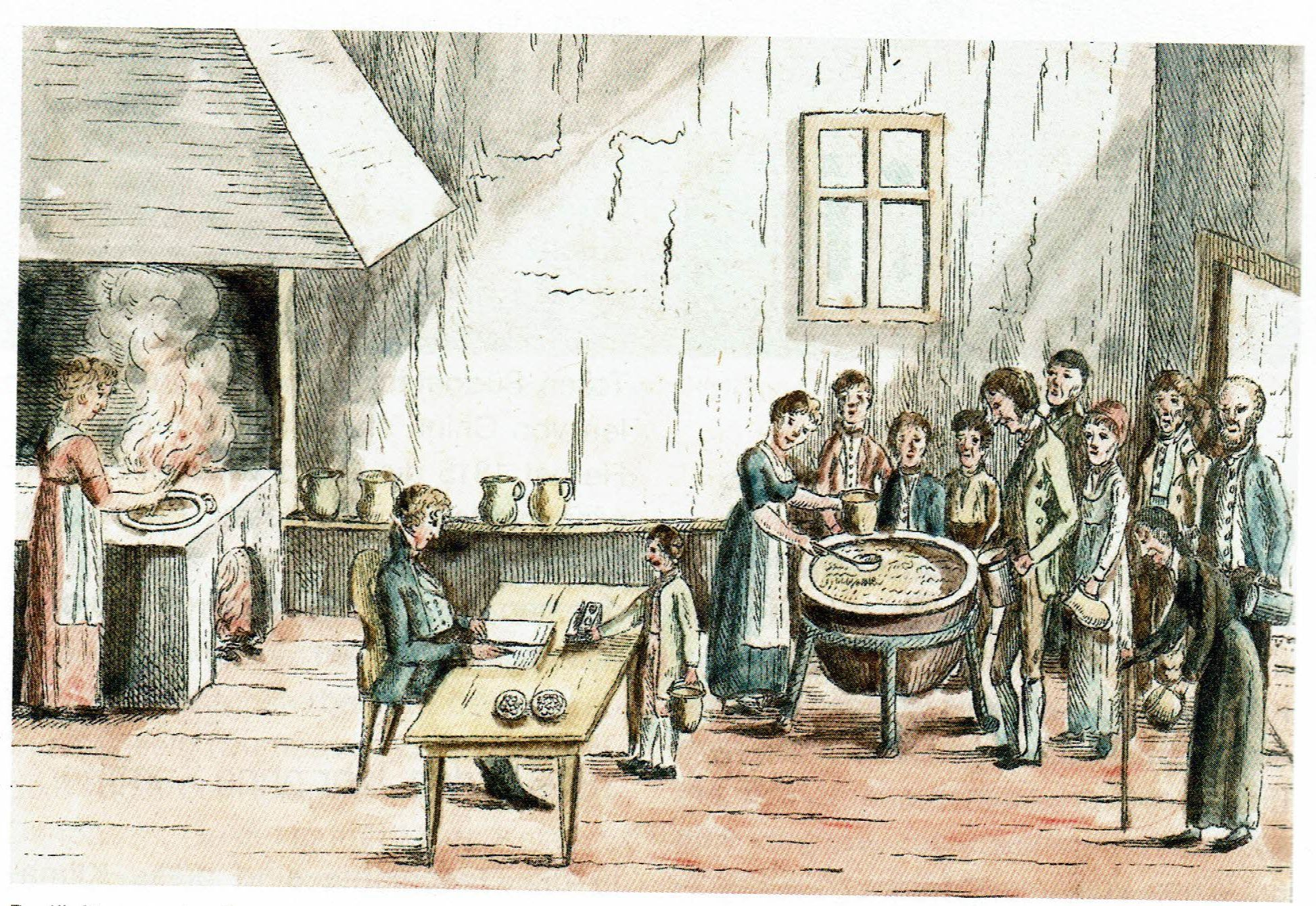 Bedürftige an der Essensausgabe an der Unteren Küche des Spitals in Ravensburg